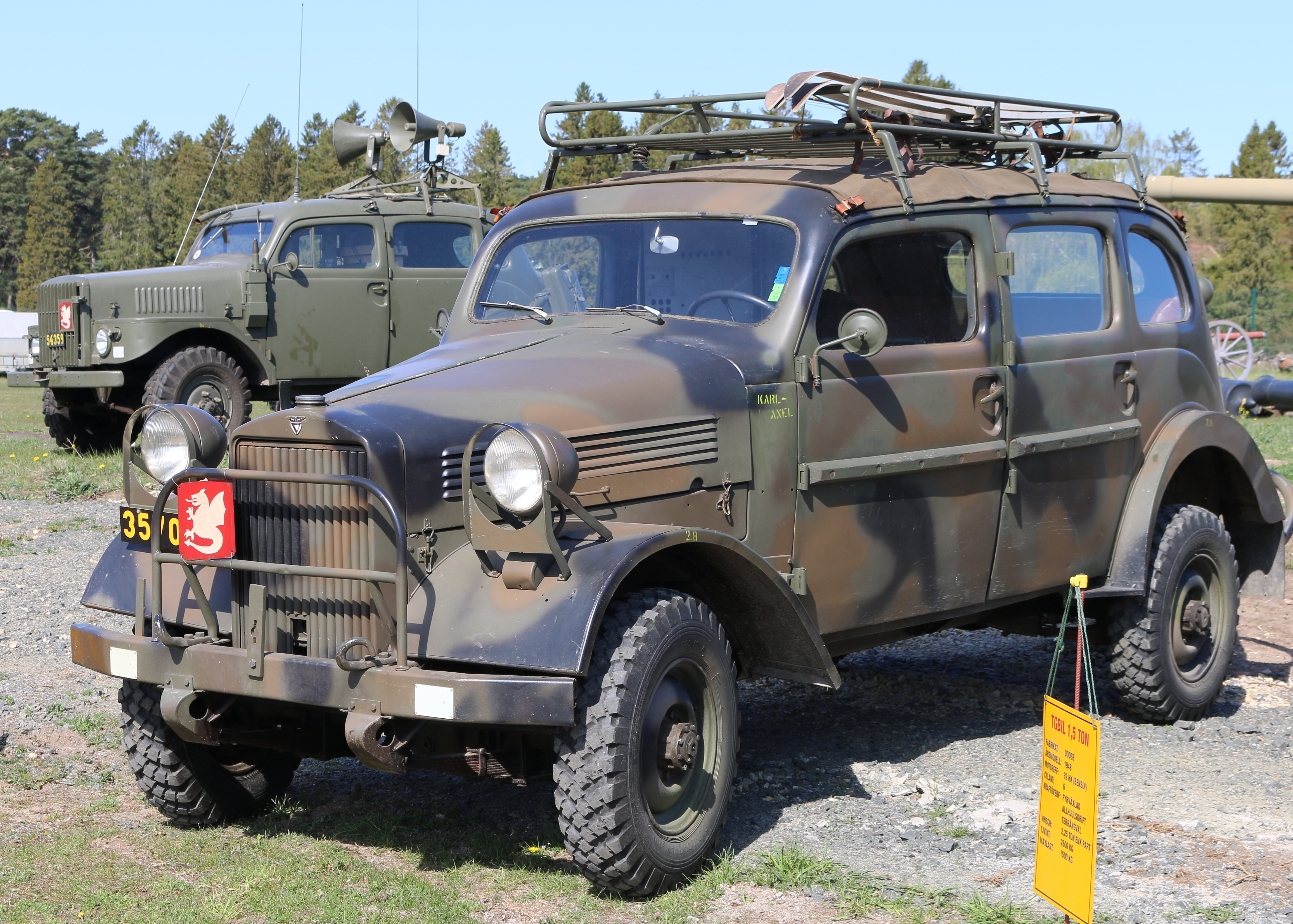 Terrängbil M 43 Artillerimuseet 2017